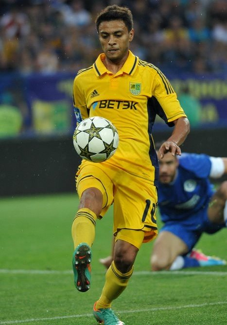 Клейтон Шав'єр - бразильський футболіст під час виступів за ФК Металіст